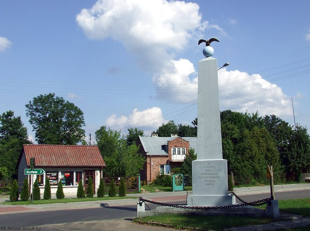 Cegłów